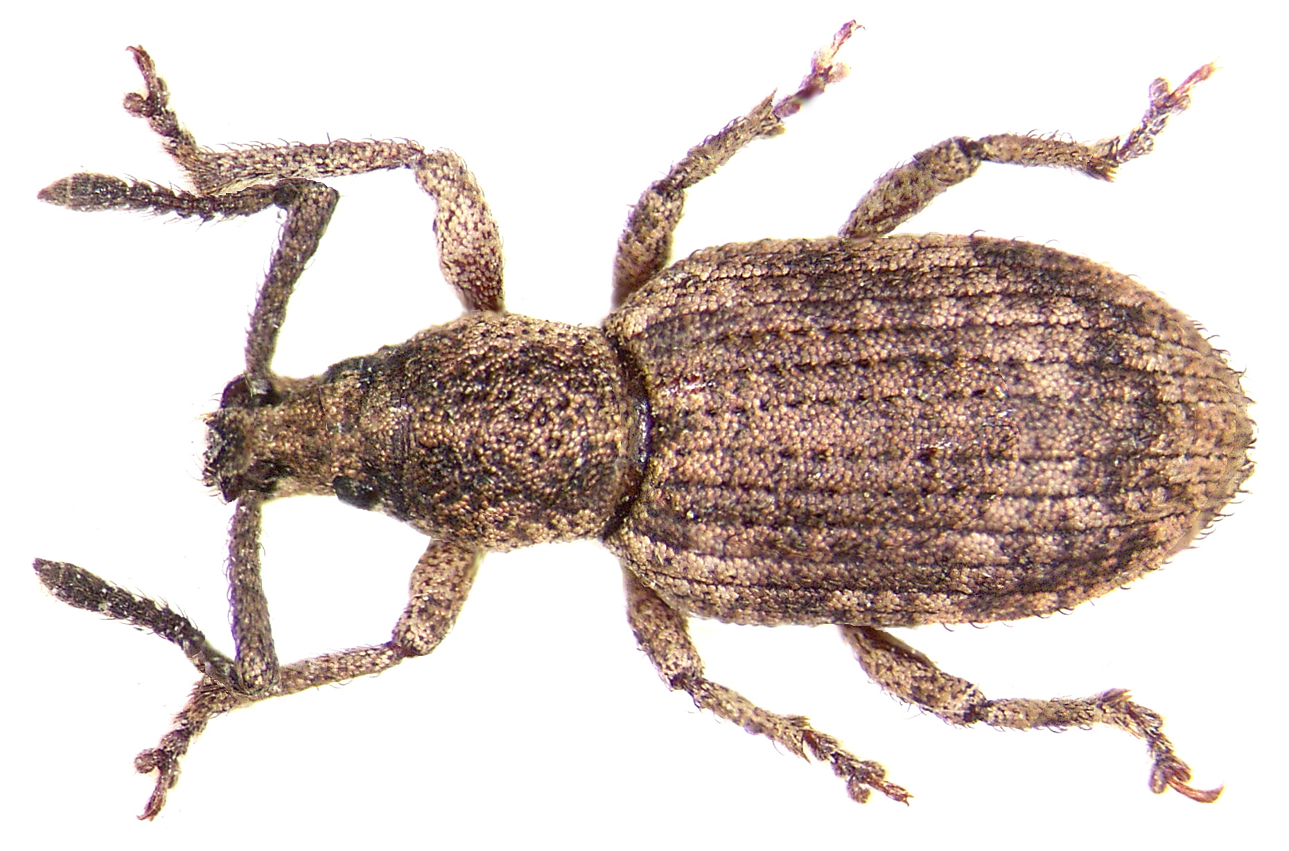 Familie: Curculionidae Grösse: 4-8,5 mm Verbreitung: Europa bis Sibirien Ökologie: polyphag auf Laub- und Nadelhölzern Fundort: Germania, Bayern, Oberfranken, Wirsberg leg.det. U.Schmidt, 1996 Foto: U.Schmidt, 2005